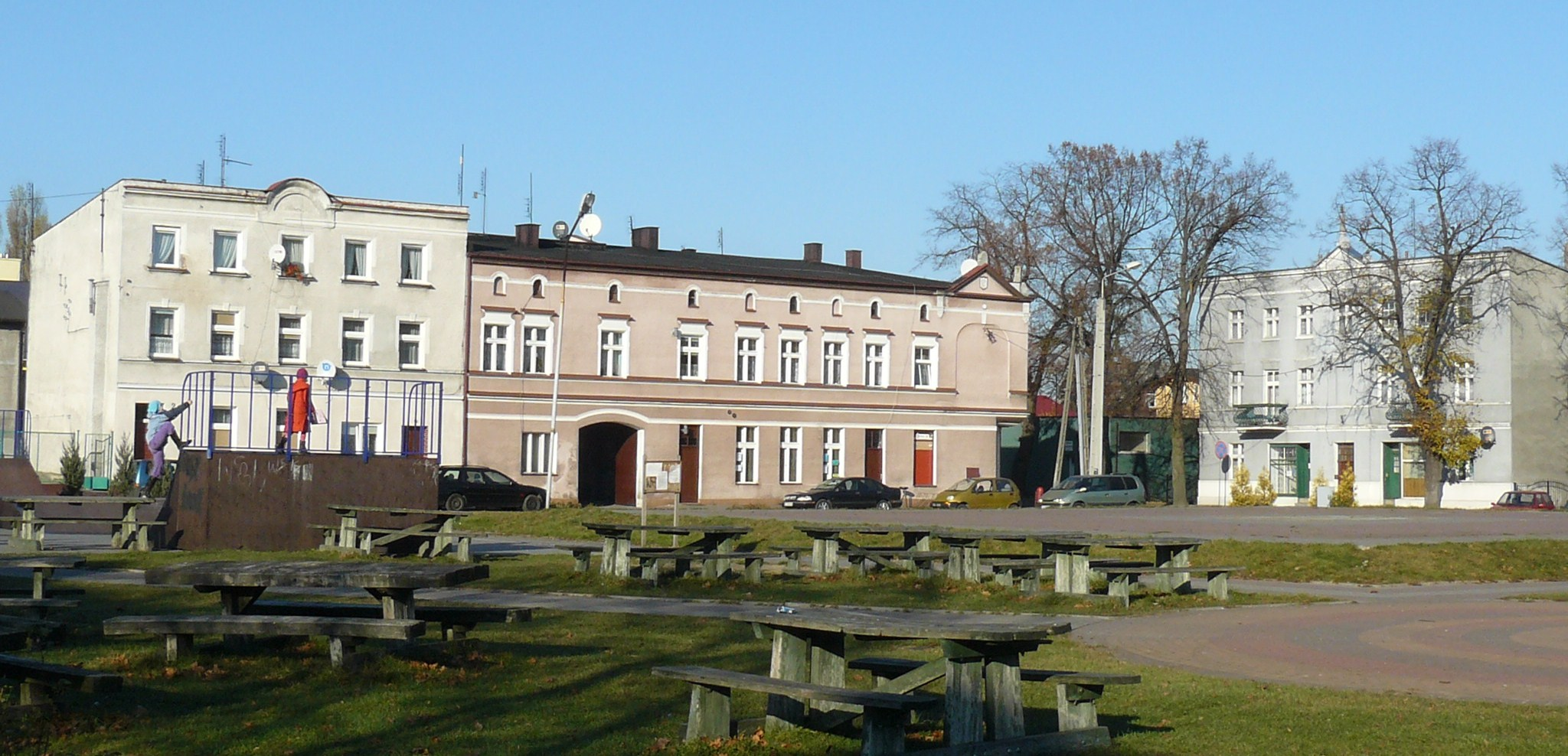 Rynek, Jabłonowo Pomorskie.